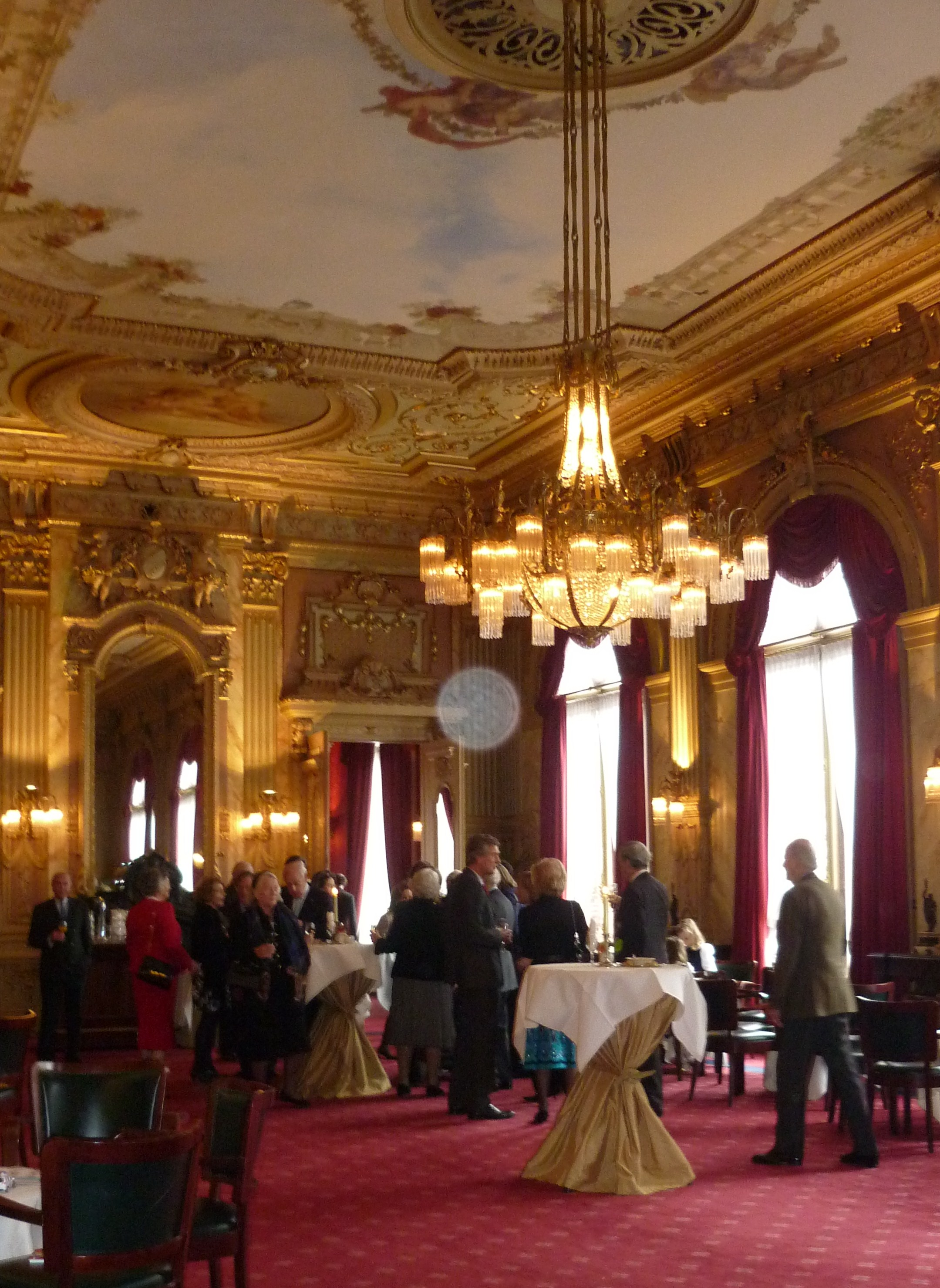 Societeit de WItte in Den Haag, Grote Zaal